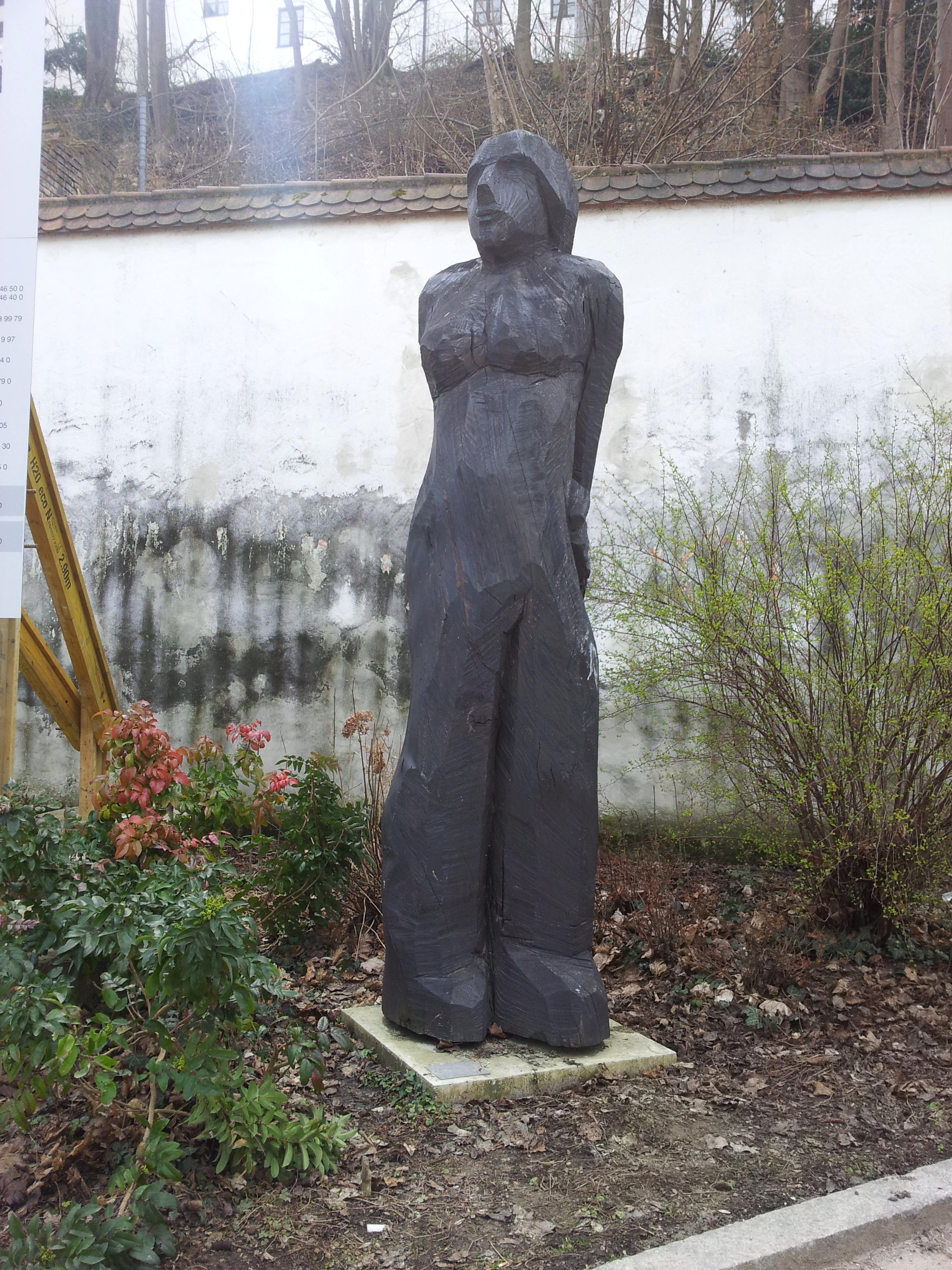 Holzstatue "Lady in Black" von Josef Lang in Freising